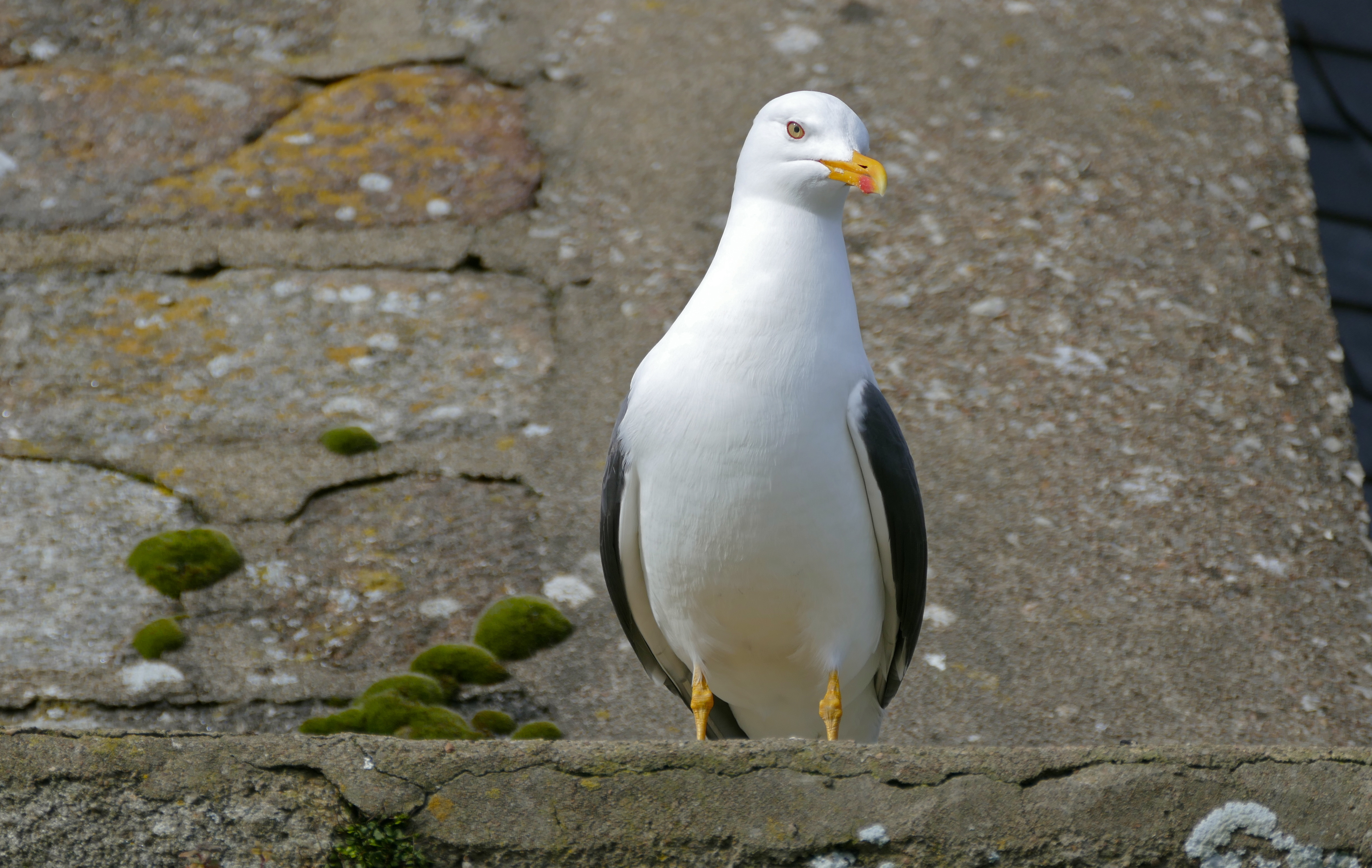 Le Mont-Saint-Michel, Manche, FRANCE